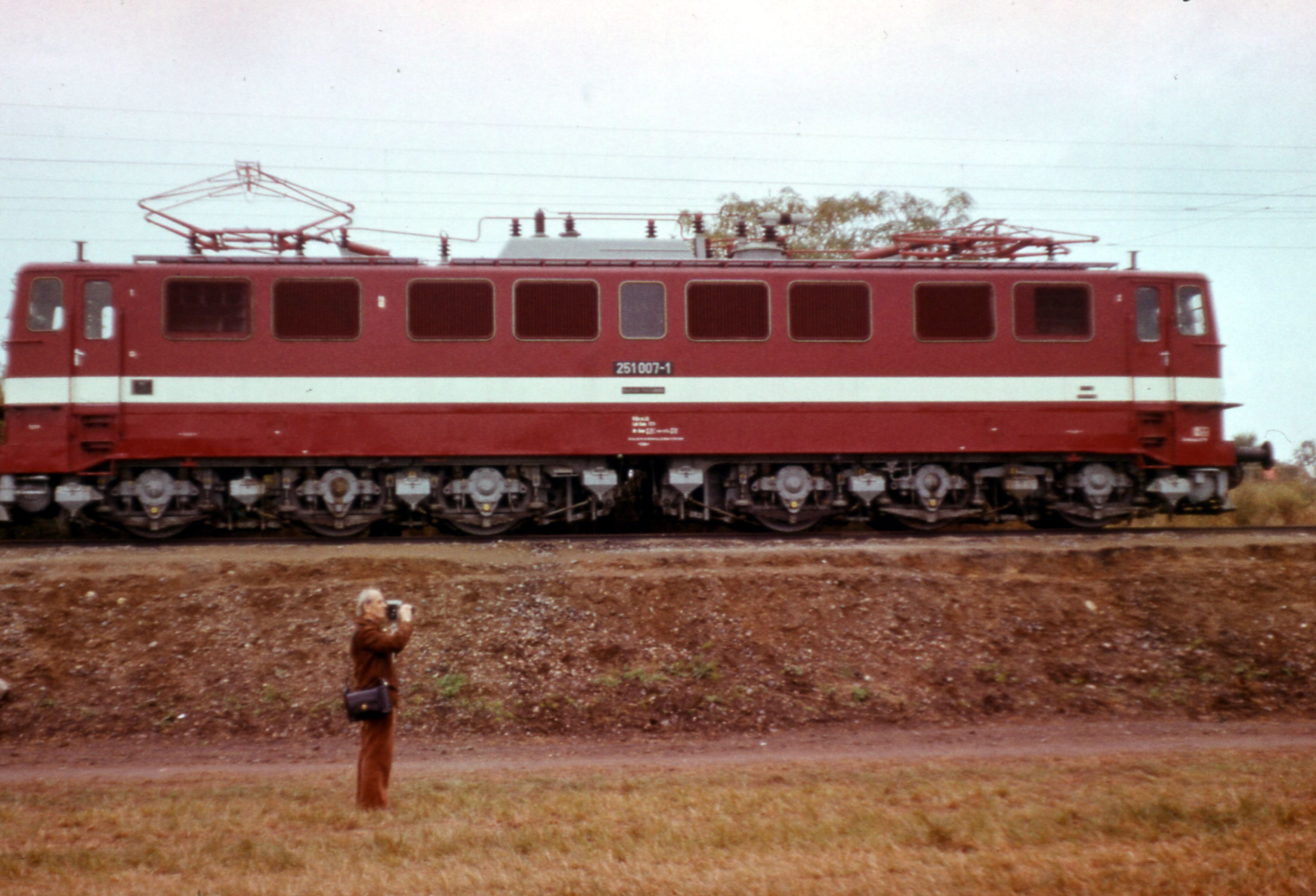 Dessau Süd, 251 007 (25kV/50Hz-Maschine der Rübelandbahn), Fahrzeugausstellung »100 Jahre elektrische Lokomotiven«. Probefahrgleis des Raw Dessau